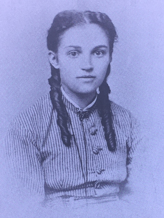 Annas mor, Emma Hammarström, 18 år. IMG 9236